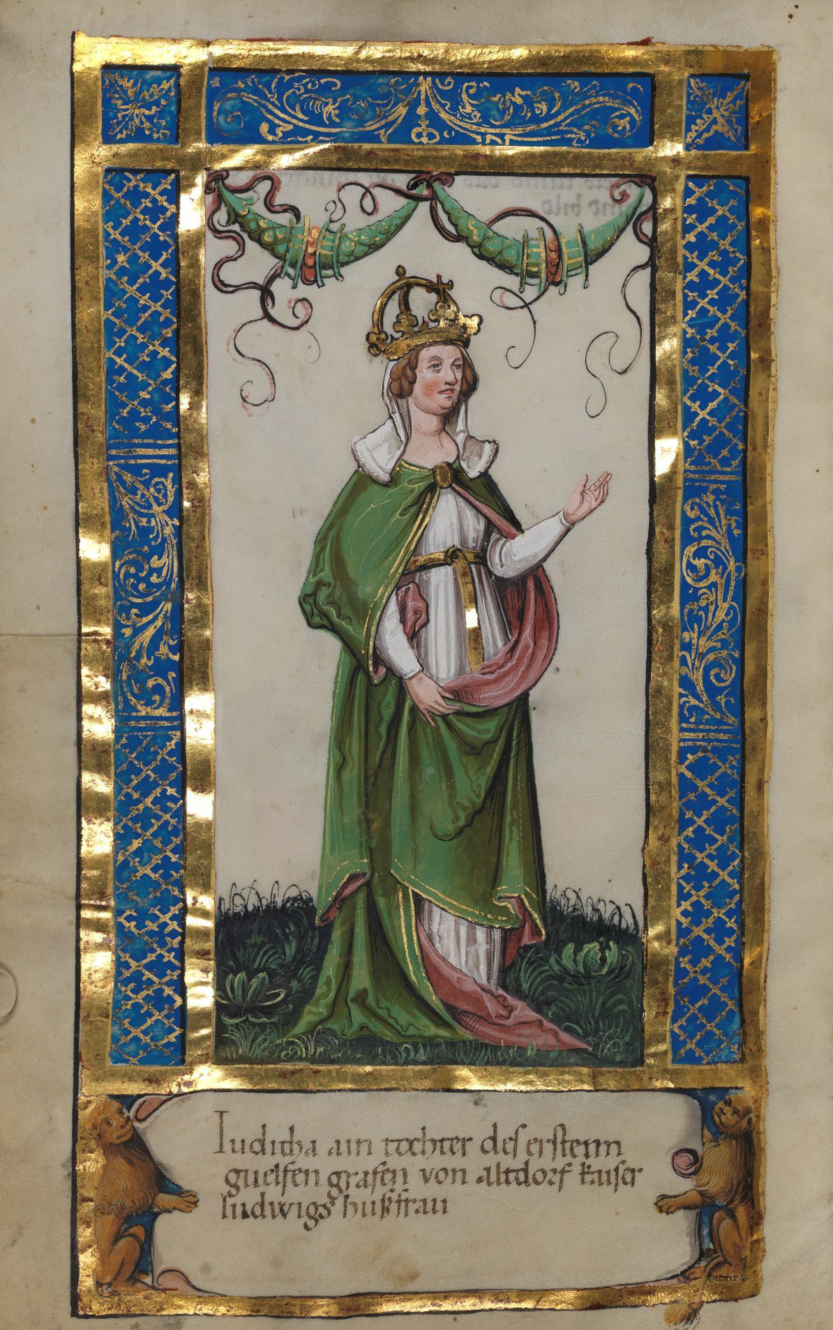 Weingartener Stifterbüchlein, Württembergische Landesbibliothek Stuttgart, Cod.hist.qt.584, fol. 11v, Stifterbild Judith, Ehefrau Ludwig des Frommen Iuditha, ain tochter des erstenn guelfen grafen von altdorf kaiser ludwigs hußfrau